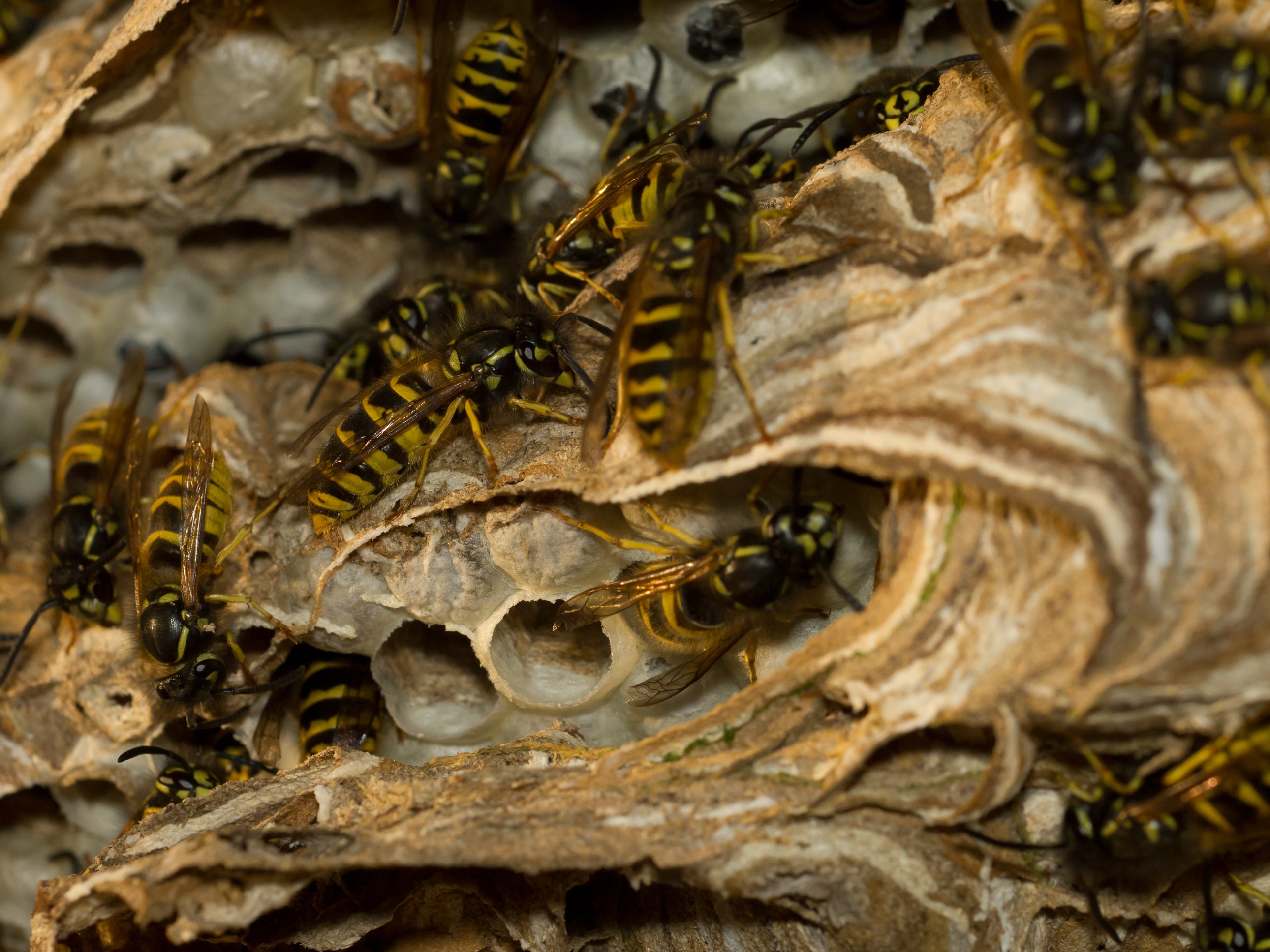 Einblick in ein geöffnetes Nest